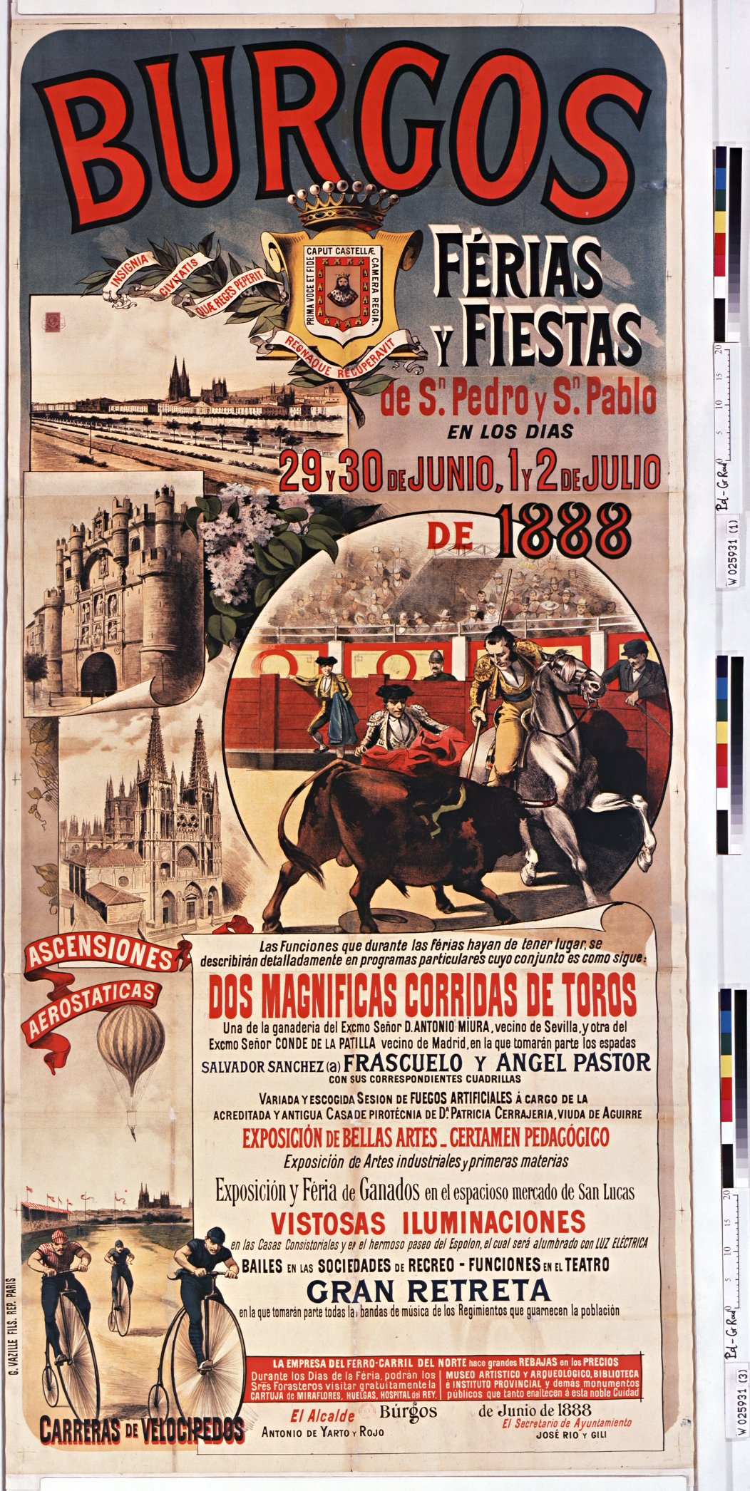 Burgos. Ferias y fiestas ... julio 1888 ..., dos magnificas corridas de toras..., gran retreta...